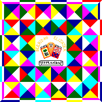 Bandera de Bérriz, en Vizcaya (España)